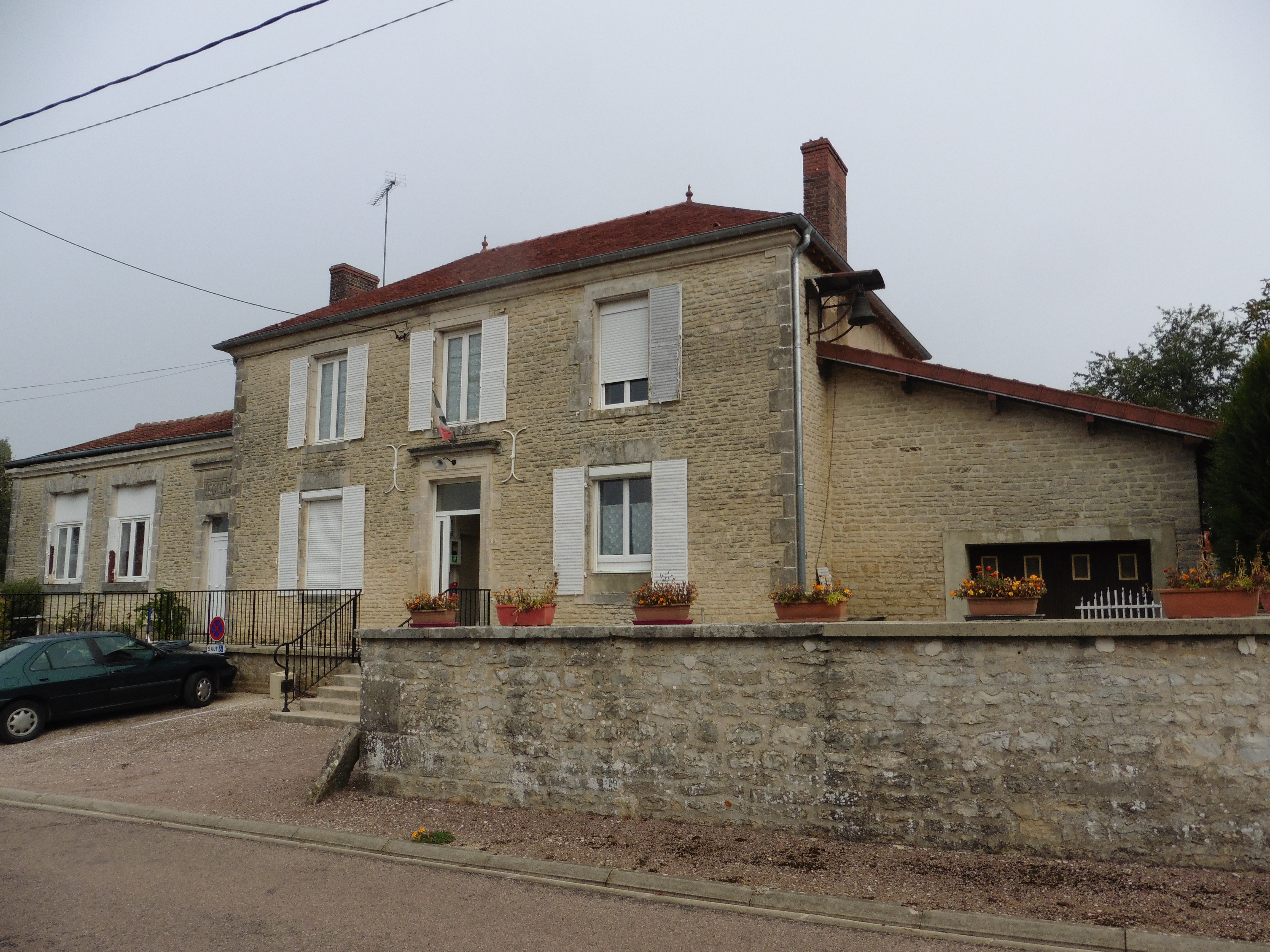 Mairie-école de Maisons-lès-Soulaines Lieu de résidence et de mariage pour Bachelard de 1914 à 1919.